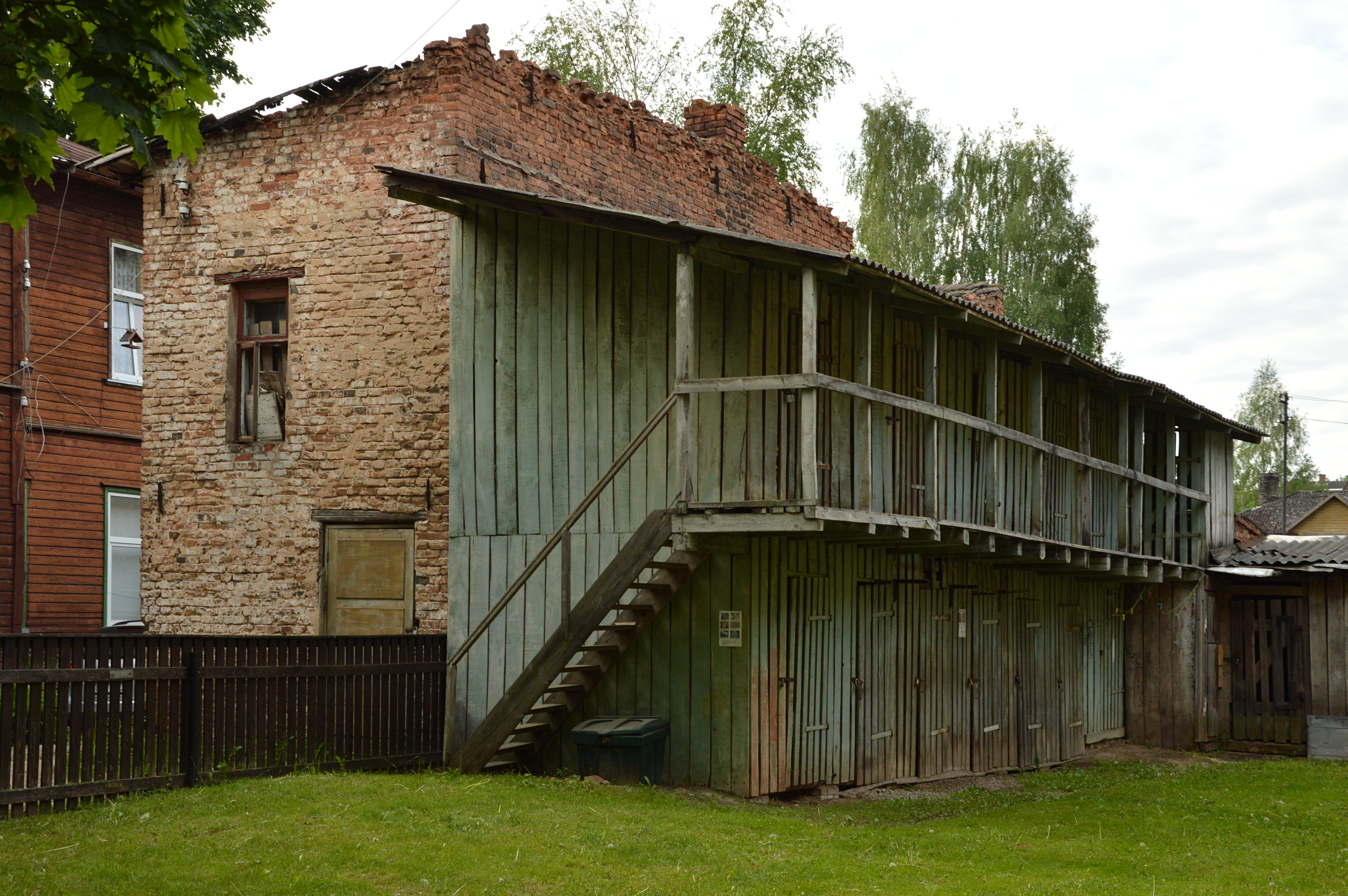 Tartule iseloomulik puidust kahekorruseline kuur.